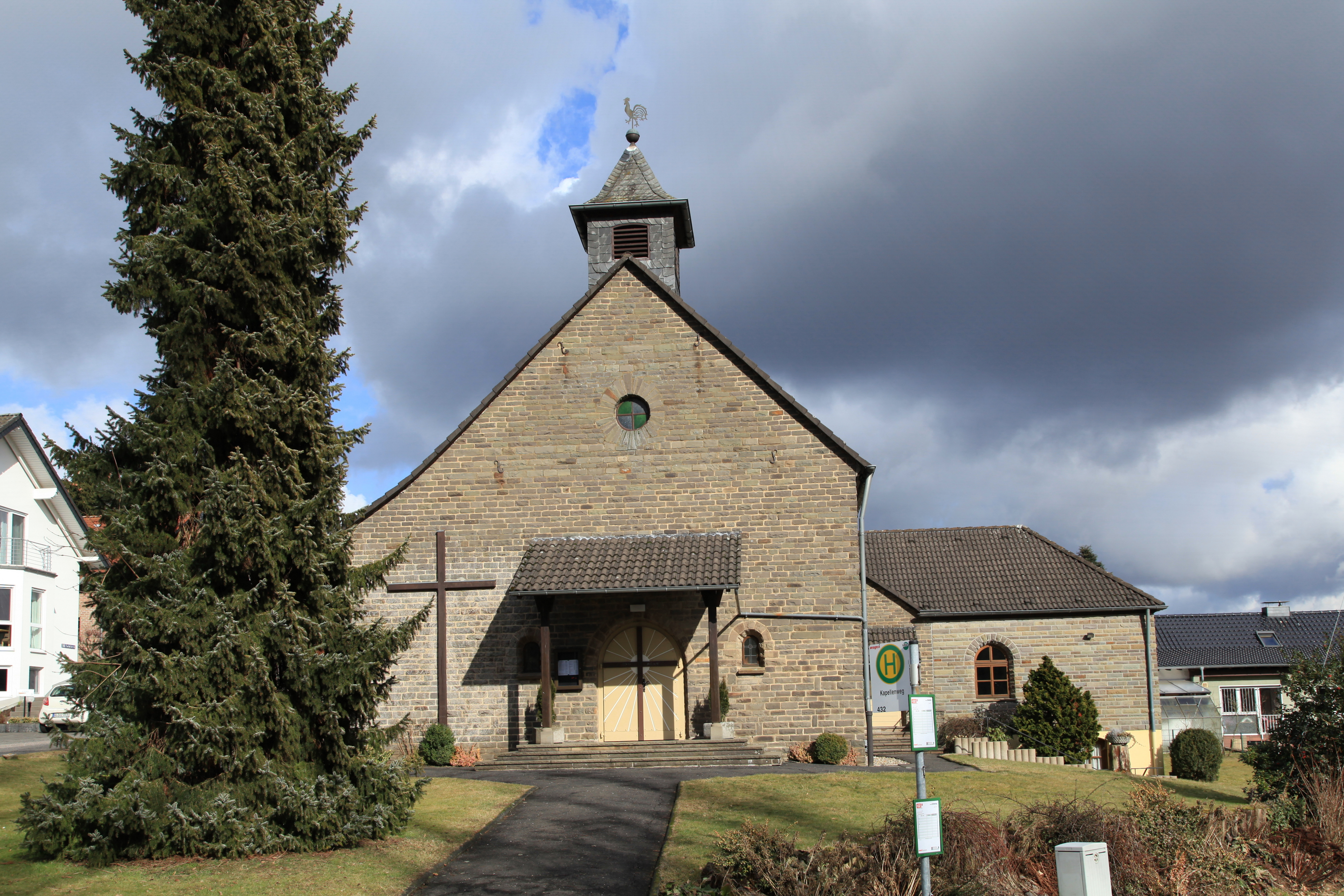 Heilig-Kreuz-Kirche, Kapellenweg 2 / An der Scherf in Odenthal-Klasmühle